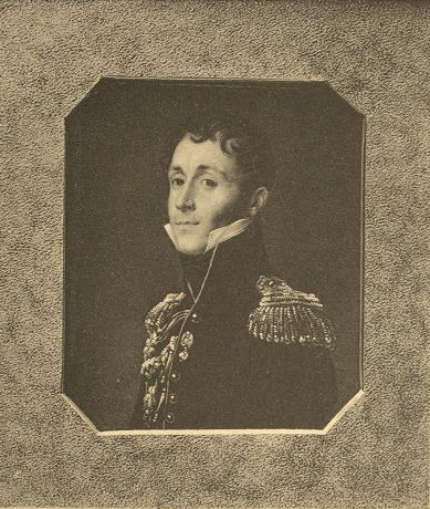 Miniatuur afbeelding Auguste-Charles-Joseph Flahaut de la Billarderie, door François Gérard.